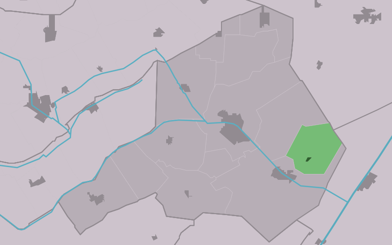 Kaartsje fan himrik fan Ravenswâld